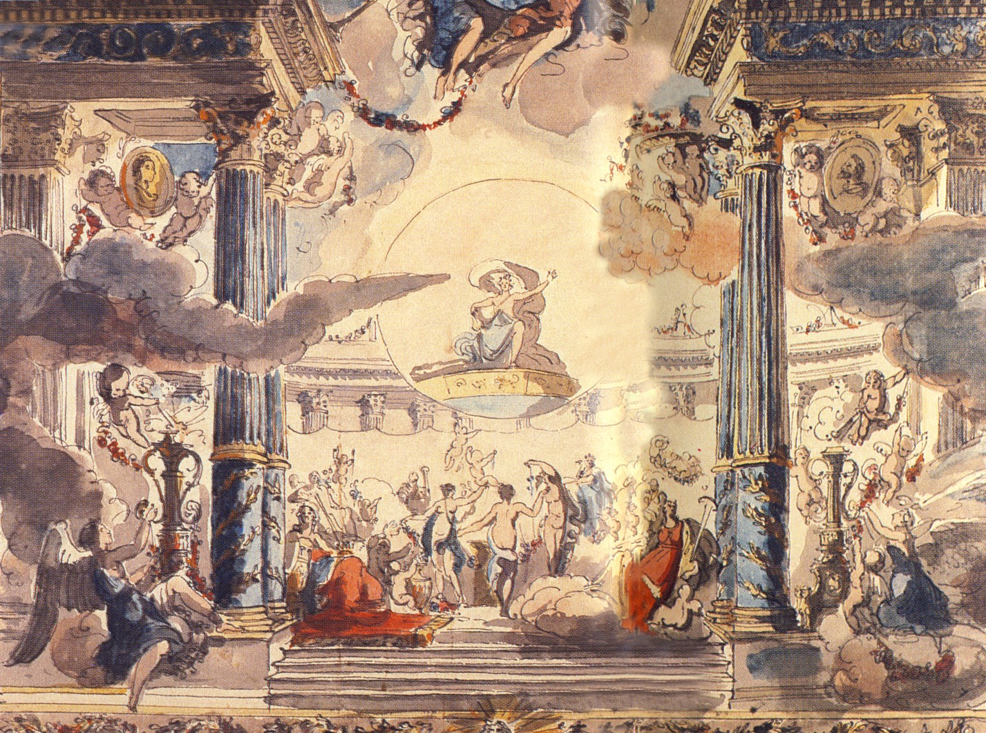 ridå för Stora Bollhuset i Stockholm sketch